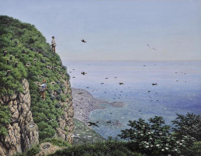 Камчатские акварели Генриха фон Киттлица (1799—1874). Остров Старичков у юго-восточного берега полуострова в южной части Авачинского залива